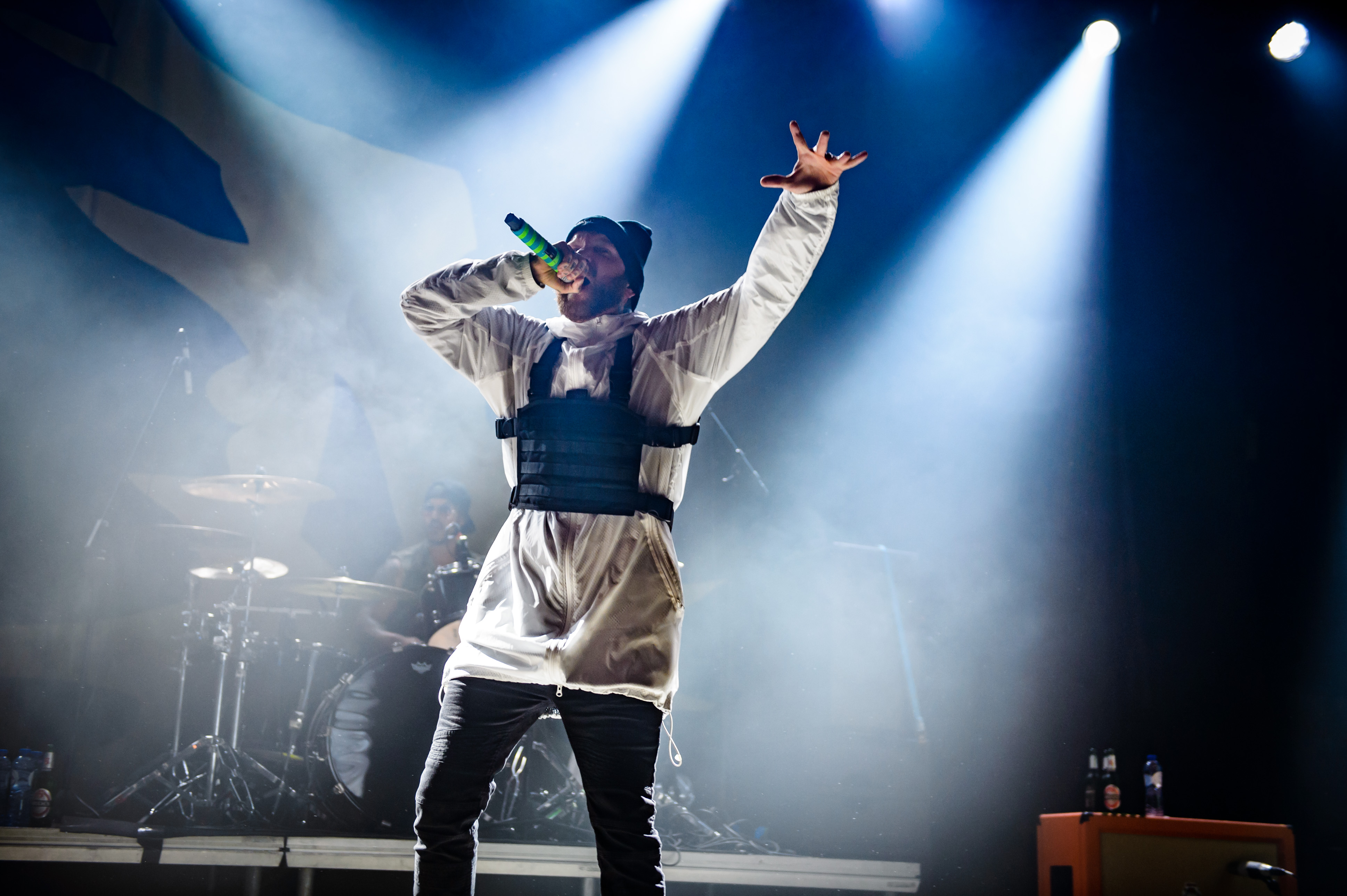 'Impericon Festival 2018; Turbinenhalle Oberhausen': 'Attila'